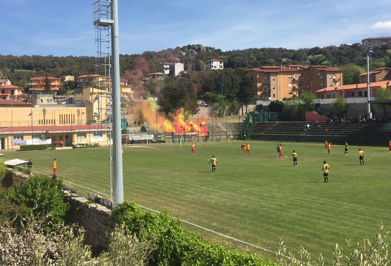 Coreografia svolta dalla curva calangianese in occasione dei play-off dell'Eccellenza Sardegna 2016-2017.